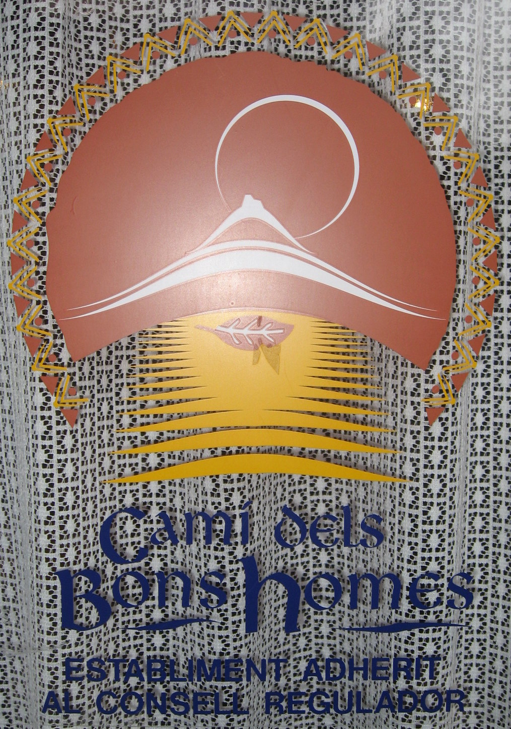 logo Cami dels Bons Homes